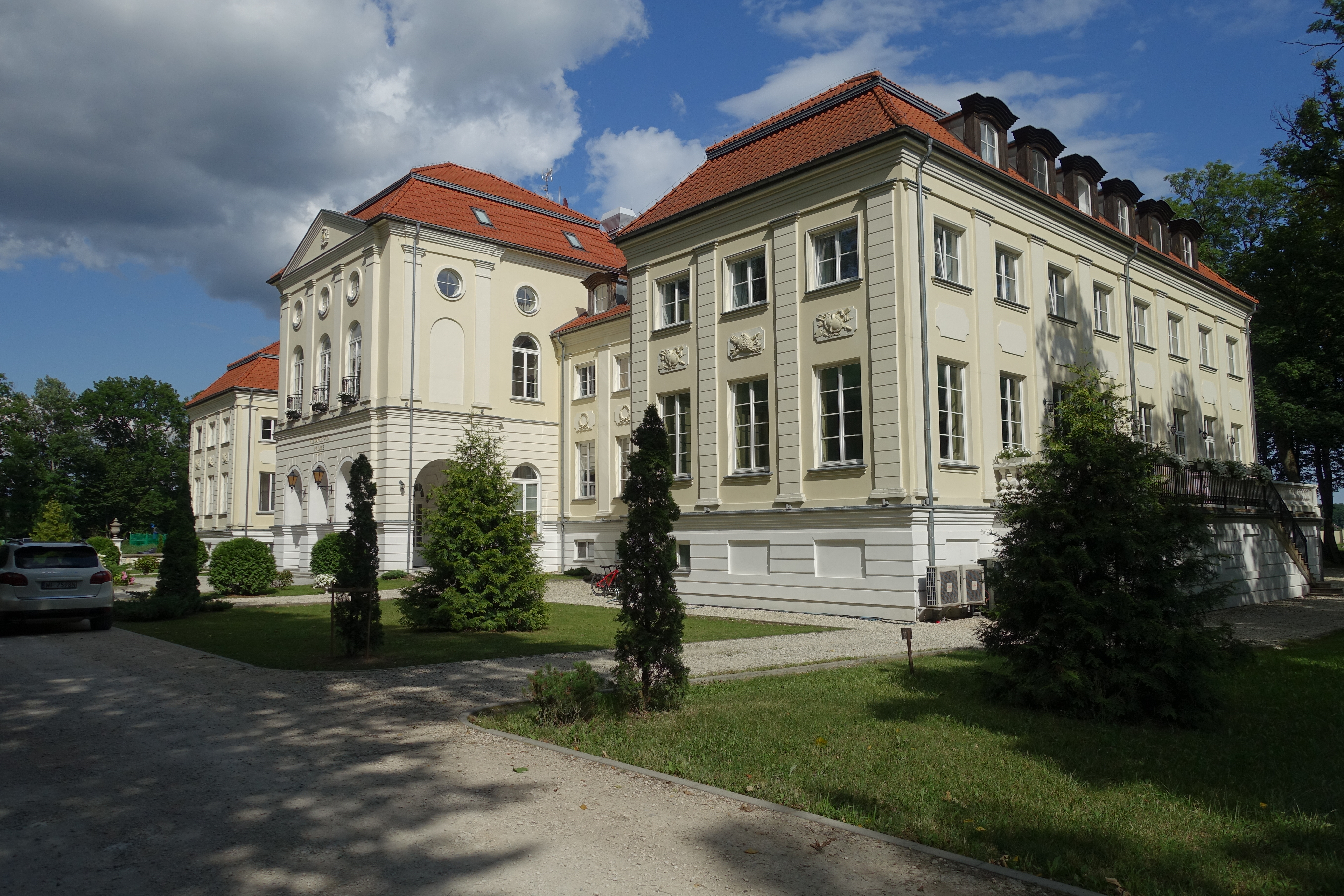 Pałac w miejscowości Krubki-Górki, stan na lipiec 2019